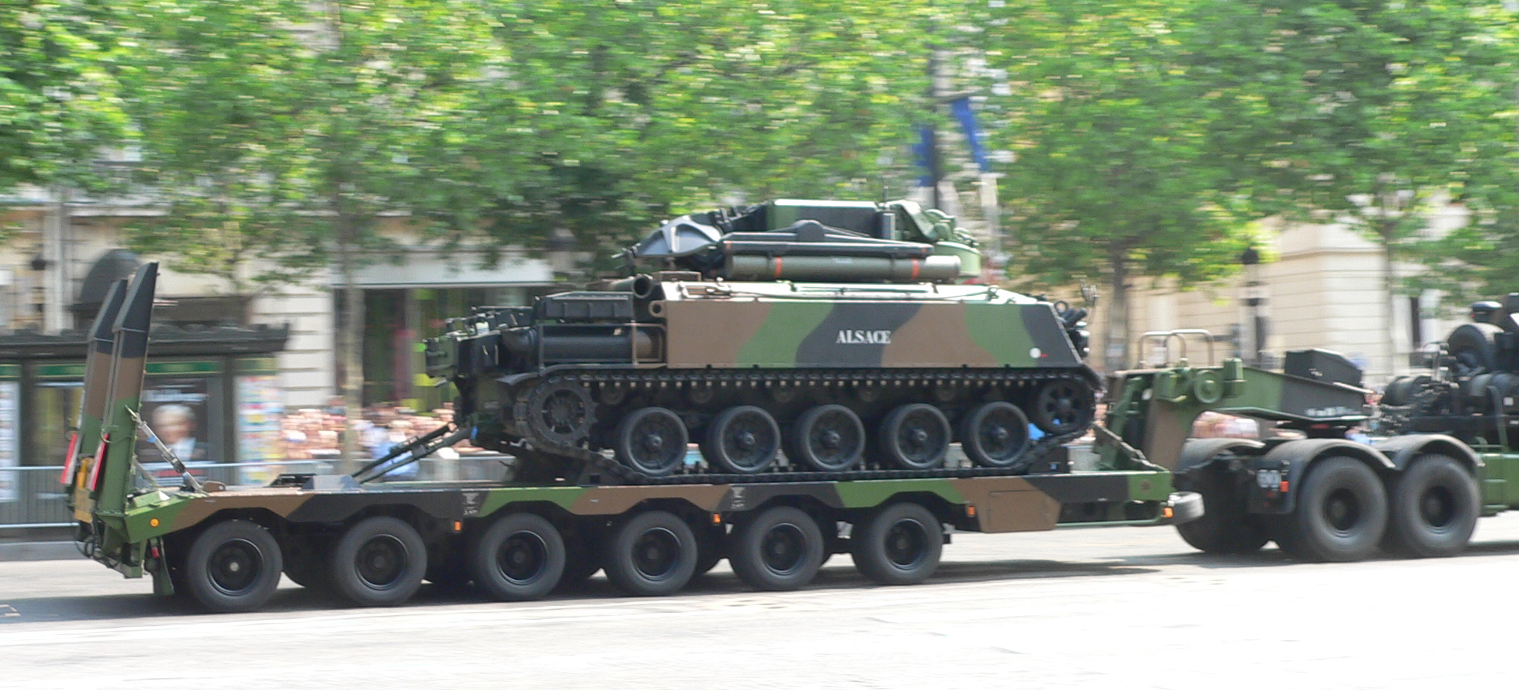 Roland SAM. Military parade, Avenue des Champs-Élysées, 14 July 2006